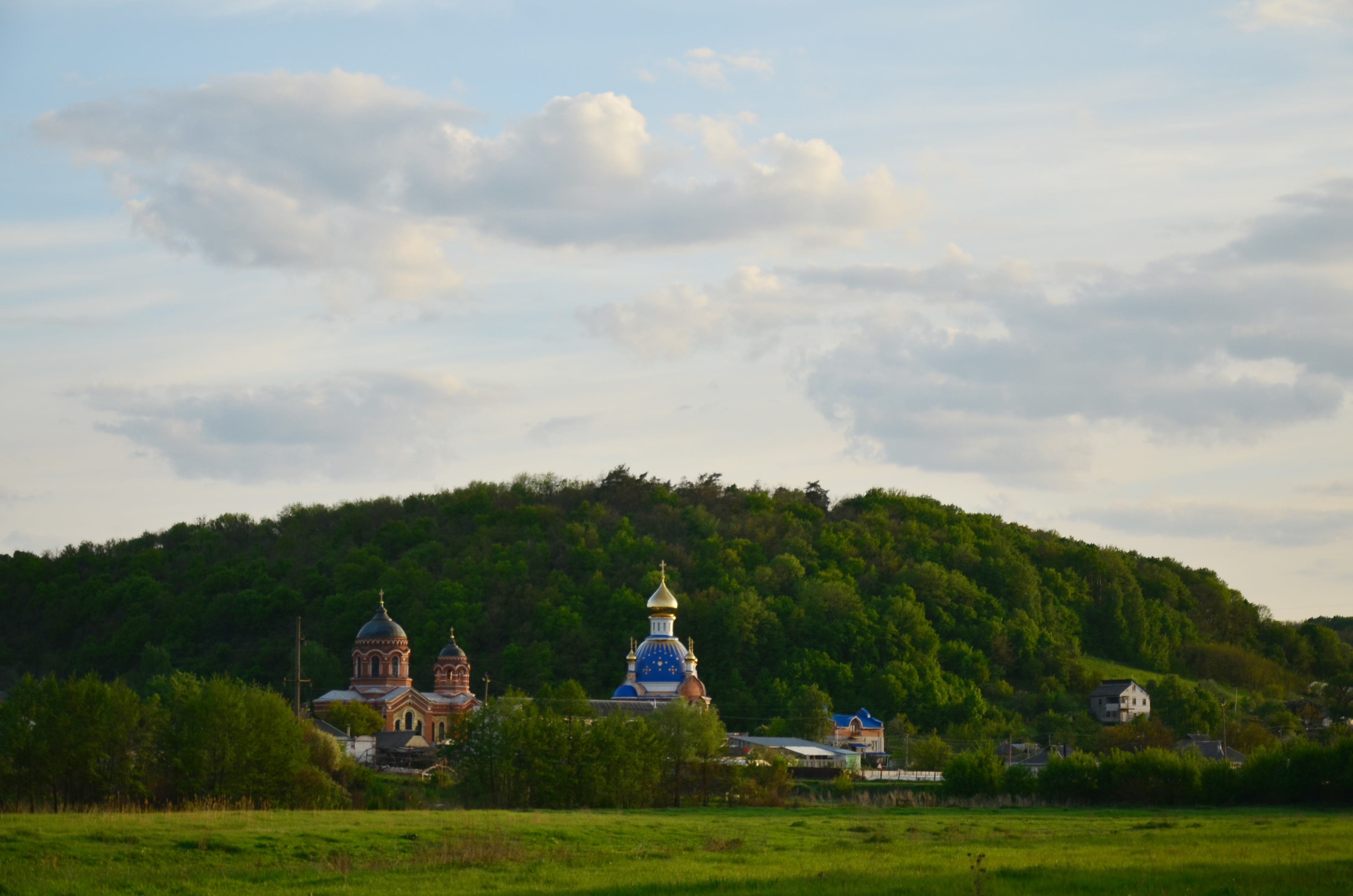 Свято-Борисо-Глібський жіночий монастир, Водяне